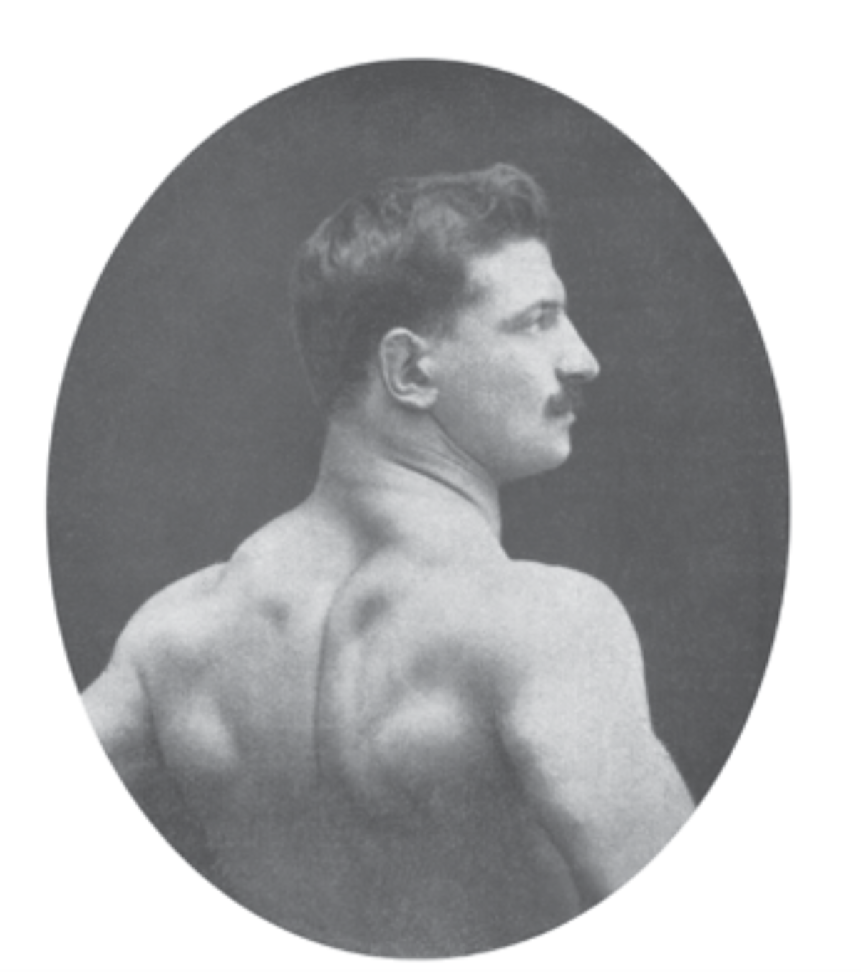 Il lottatore Elia Pampuri